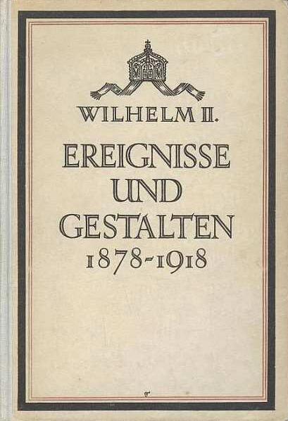 Wilhelm II.: Ereignisse und Gestalten aus den Jahren 1878-1918, cover of the Kaiser's memoirs, Leipzig/Berlin : Koehler 1922